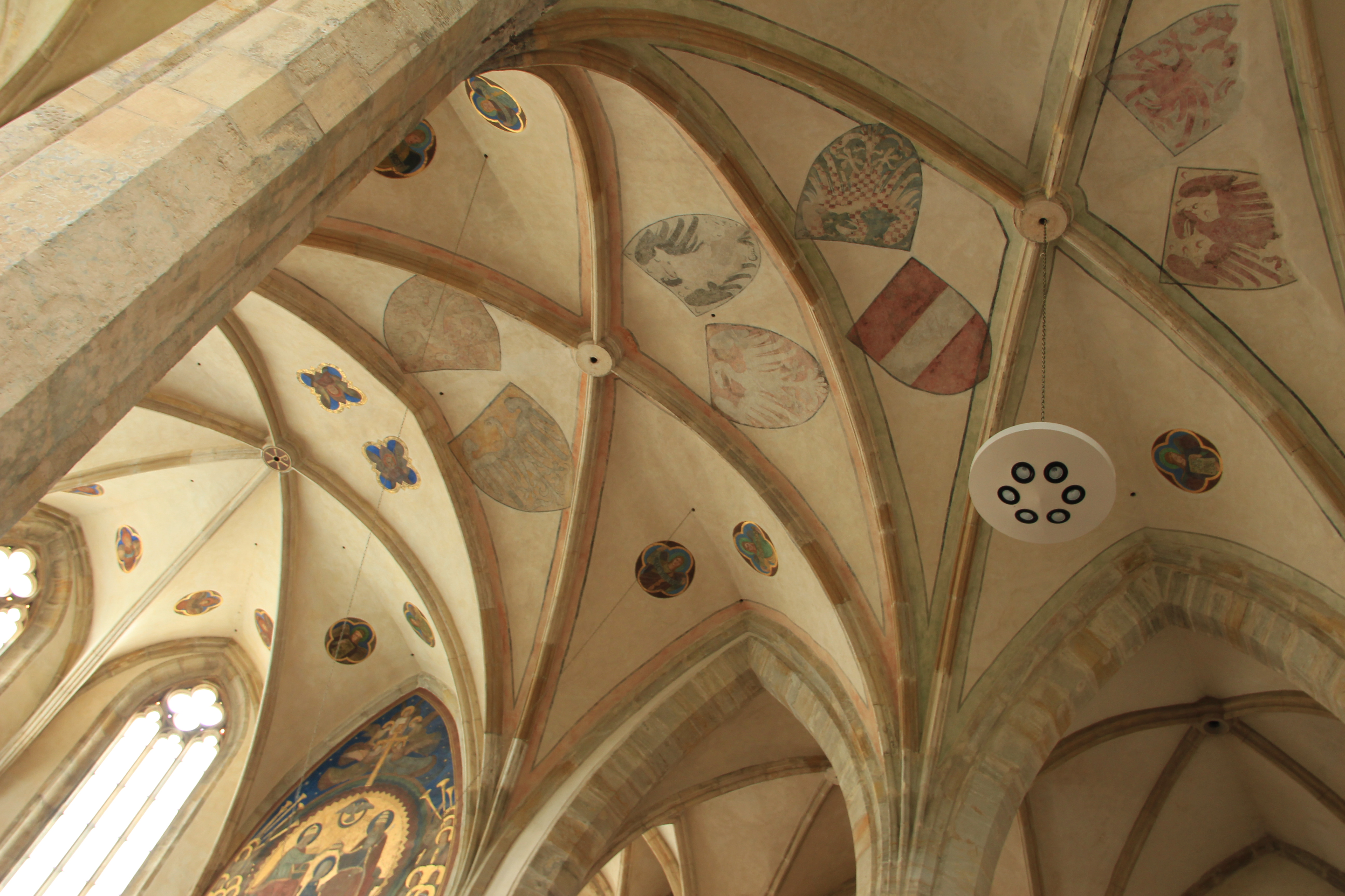 Klenba nad hlavným oltárom